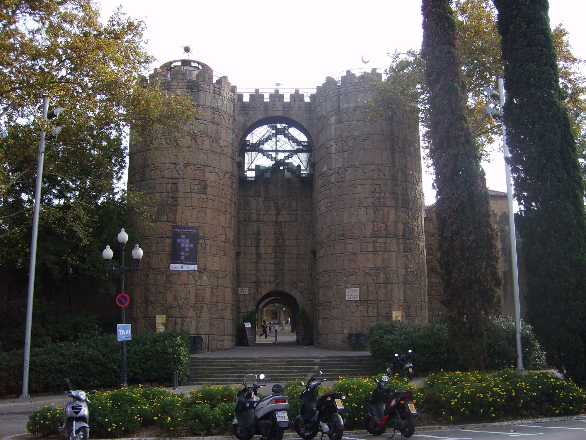 Entrada al Poble Espanyol de Barcelona